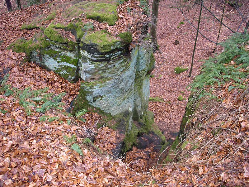 Felsburgstall Teufelsstein in den fränkischen Haßbergen. Der Aufgang auf das Burgplateau. Eigene Aufnahme, April 2006